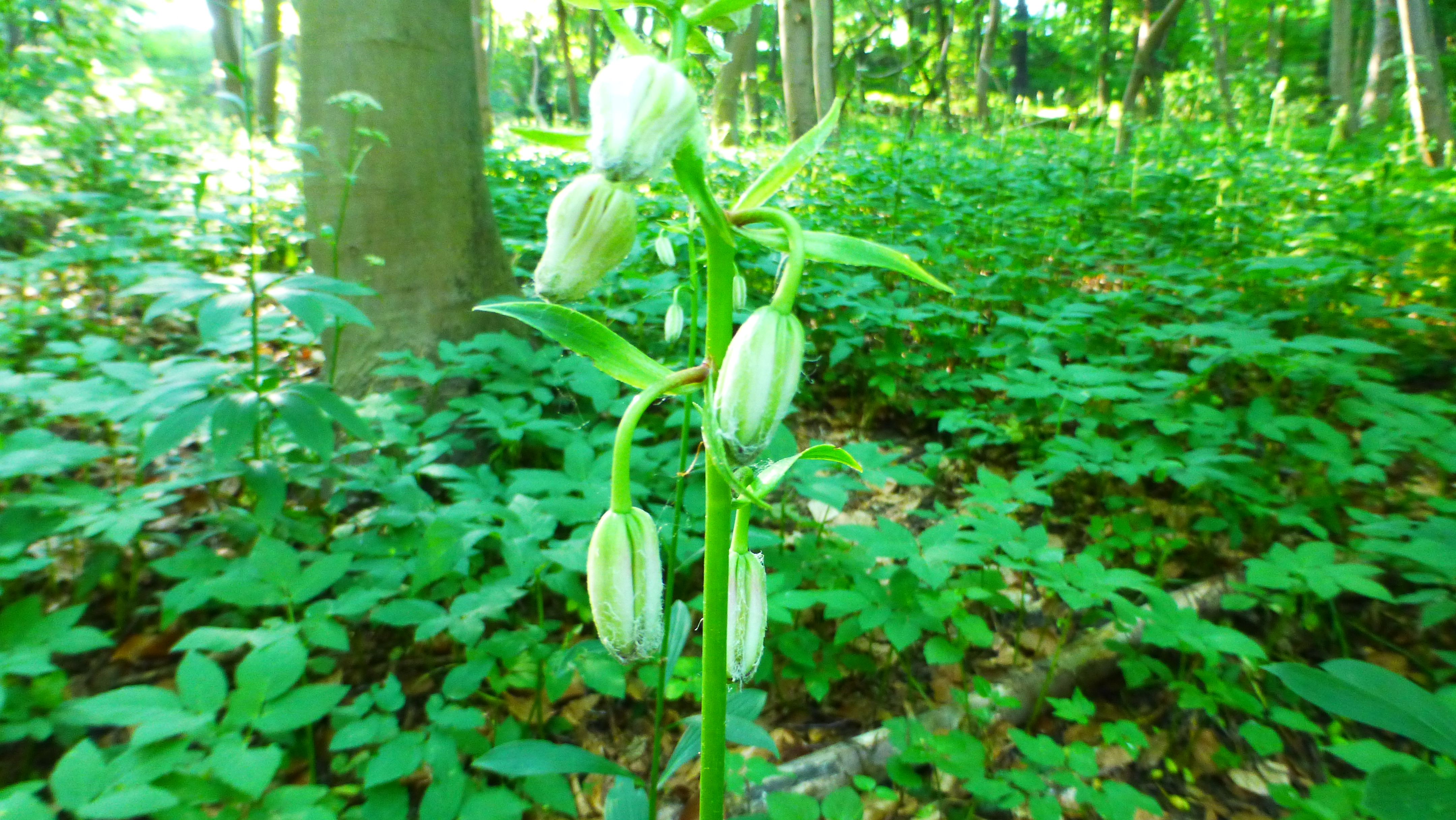 Türkenbund (Lilium martagon) am natürlichen Standort im Zehling